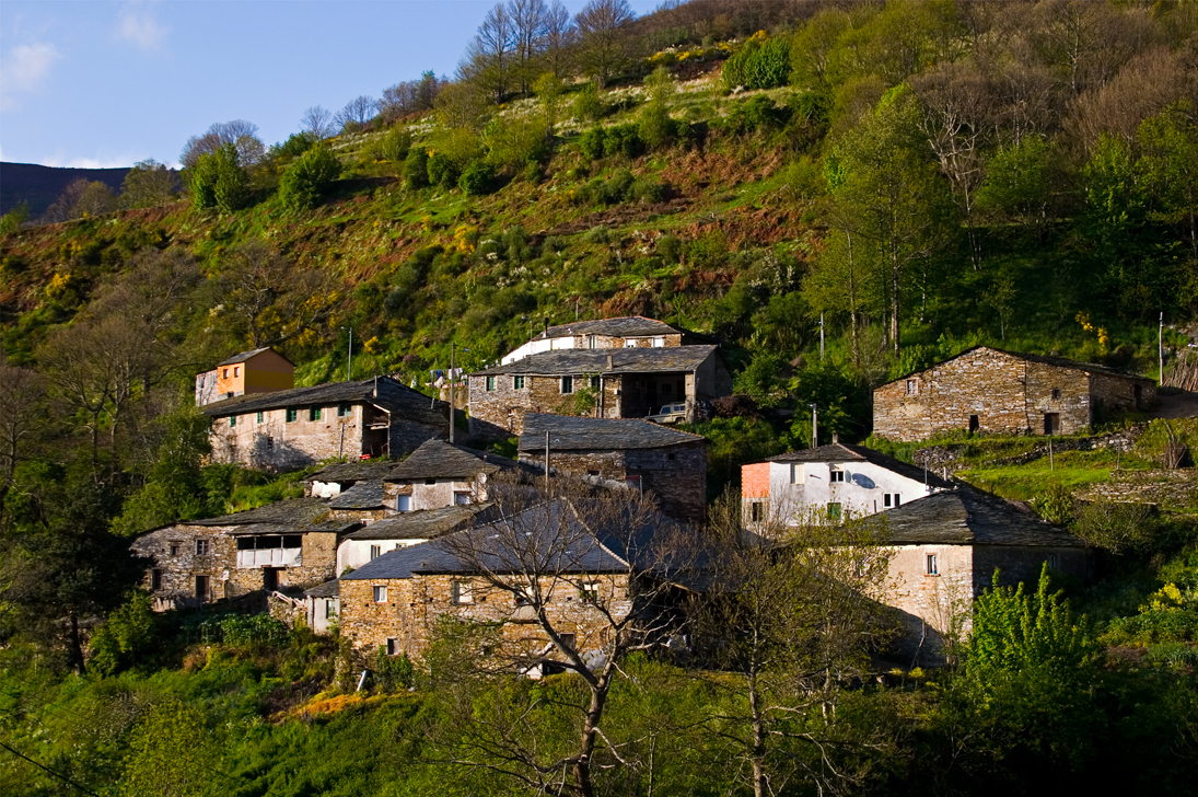 Visuña, Folgoso do Courel